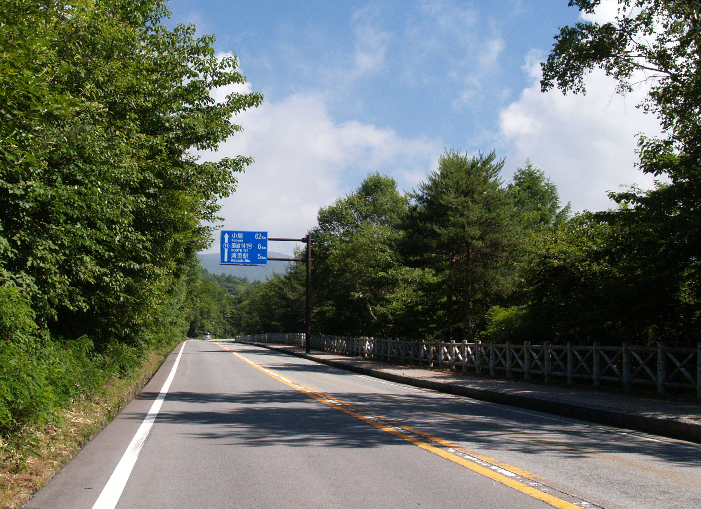 山梨県道・長野県道11号北杜富士見線（北杜市内にて）